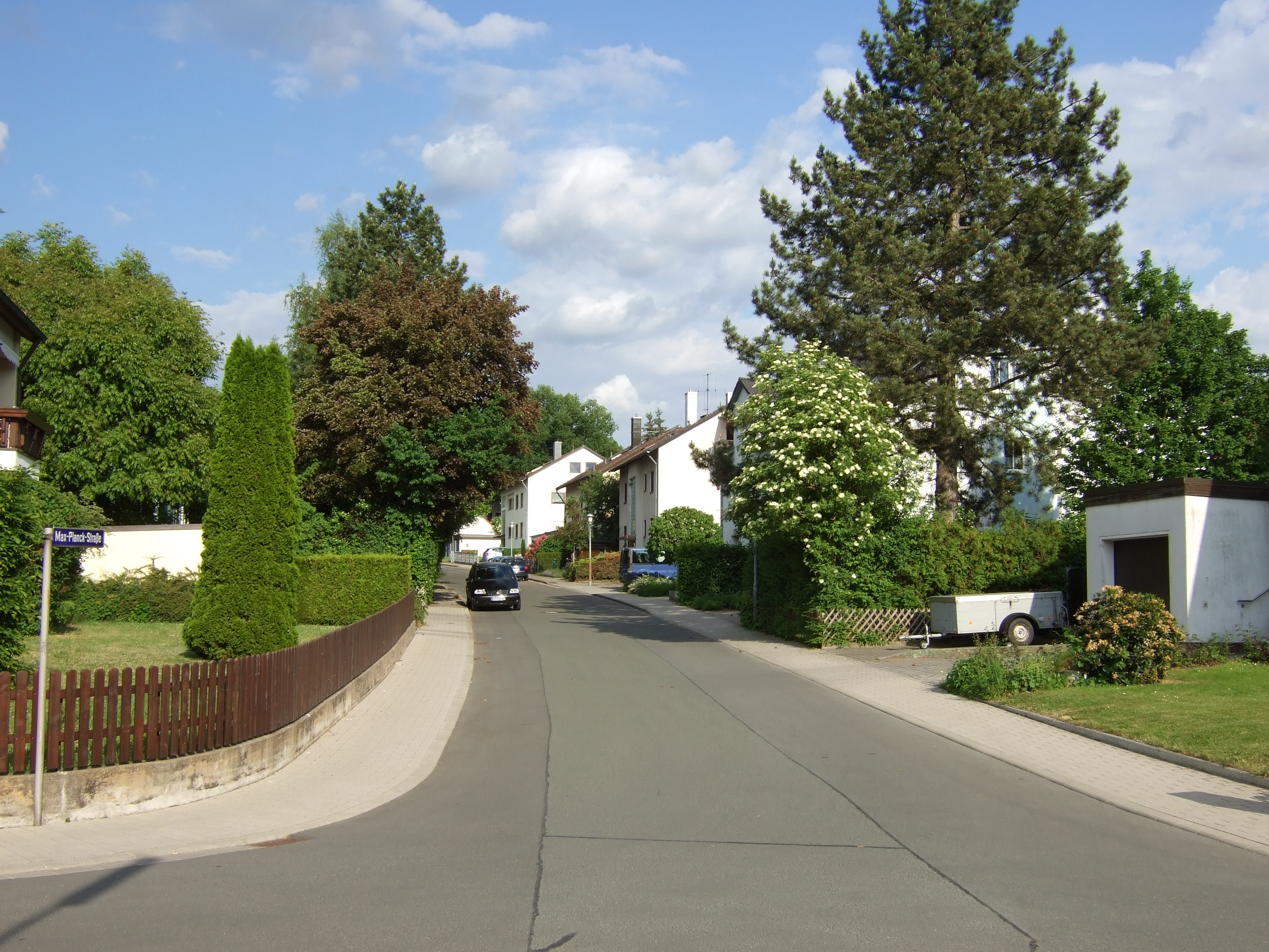 Bayreuth, Neubaugebiet Colmdorf